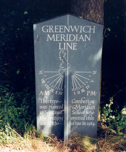 Meridian marker